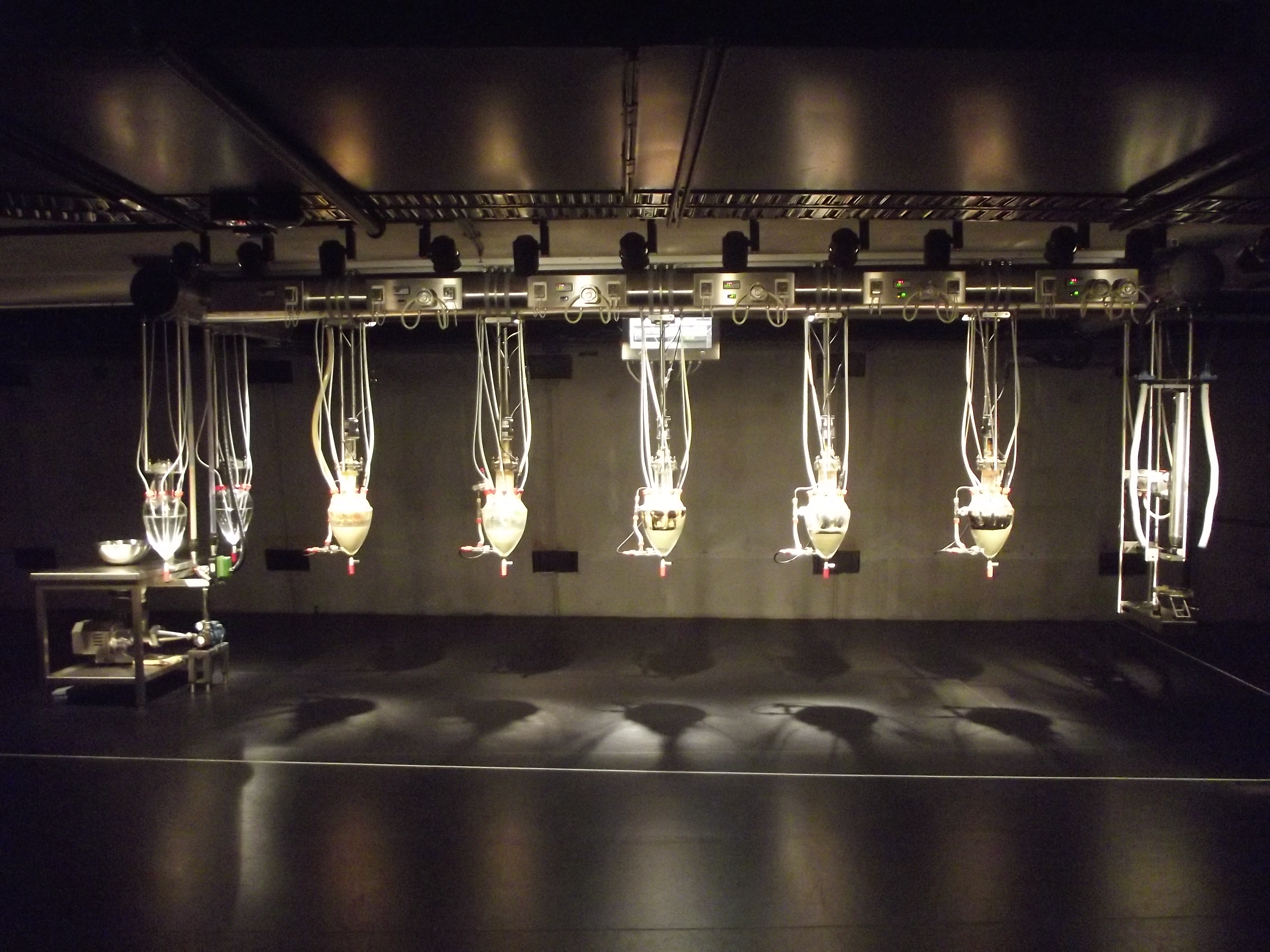 Berriedale TAS 7011, Australia